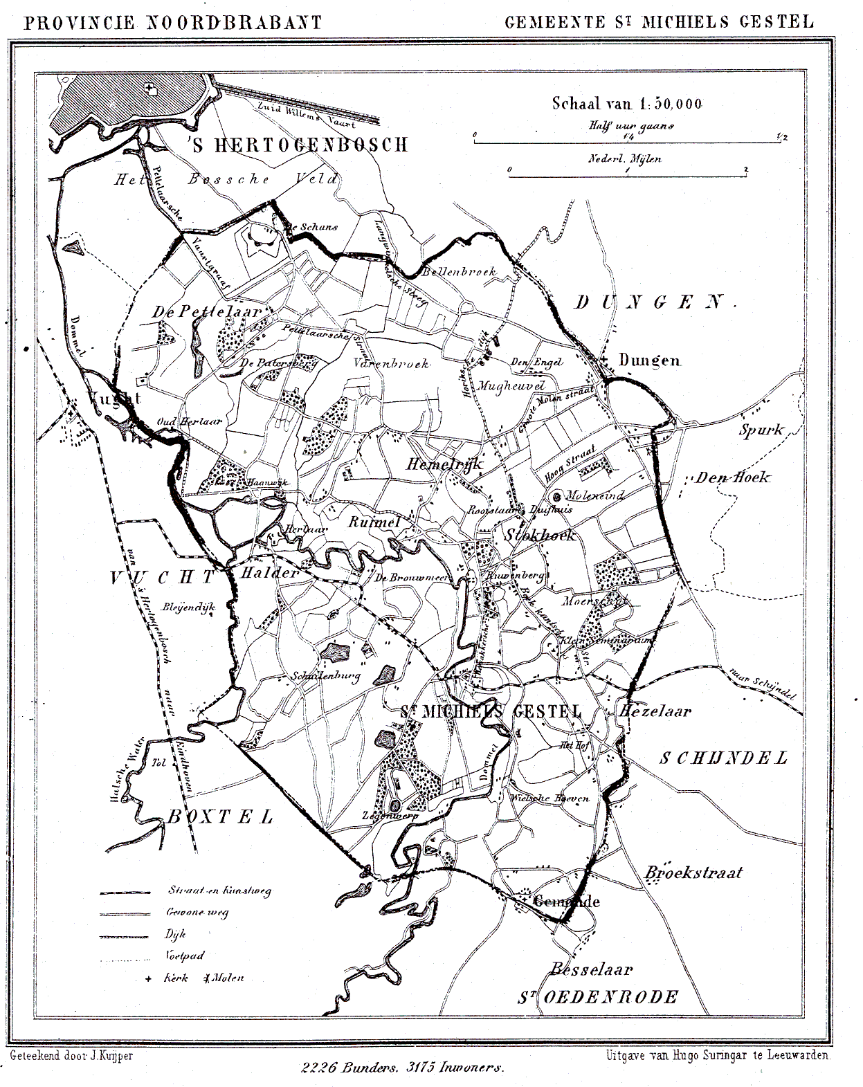 Nederland, Noord-Brabant, Gemeente Sint Michielsgestel